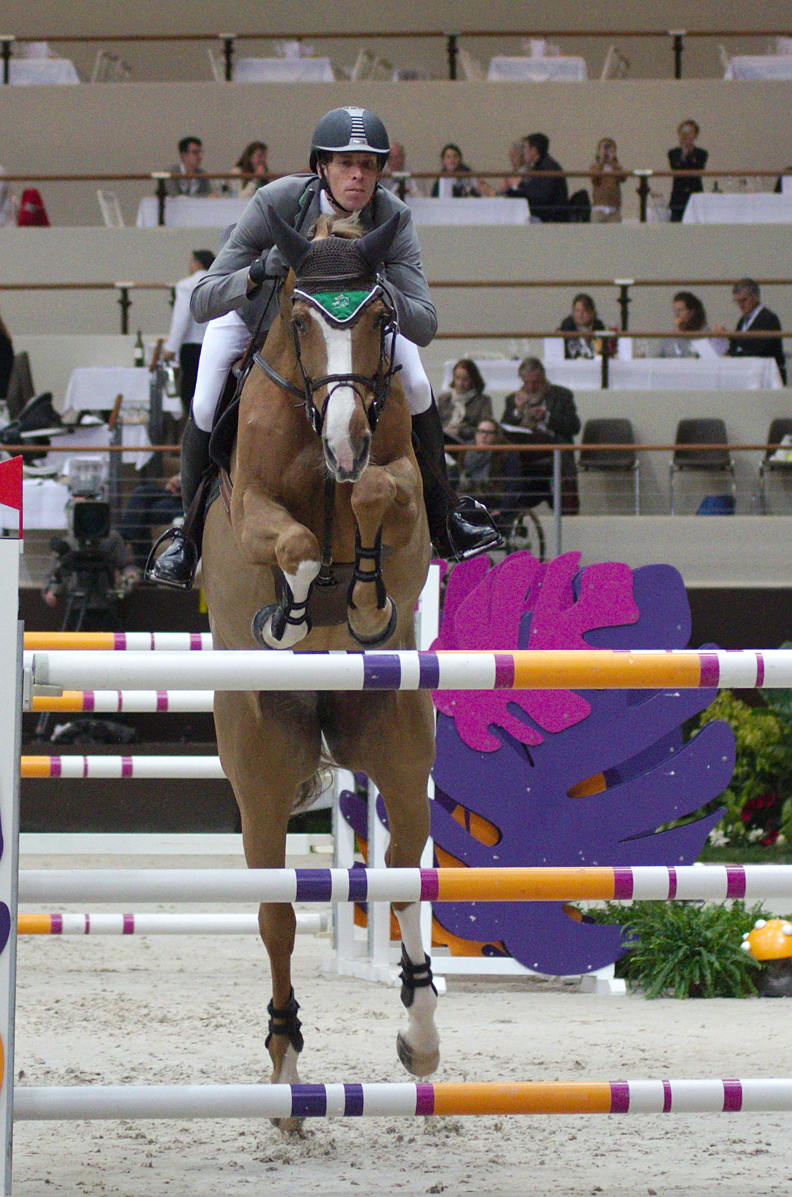 54eme CHI de Genève - 20141213 - Coupe de Genève - Henrik Von Eckermann et Gotha